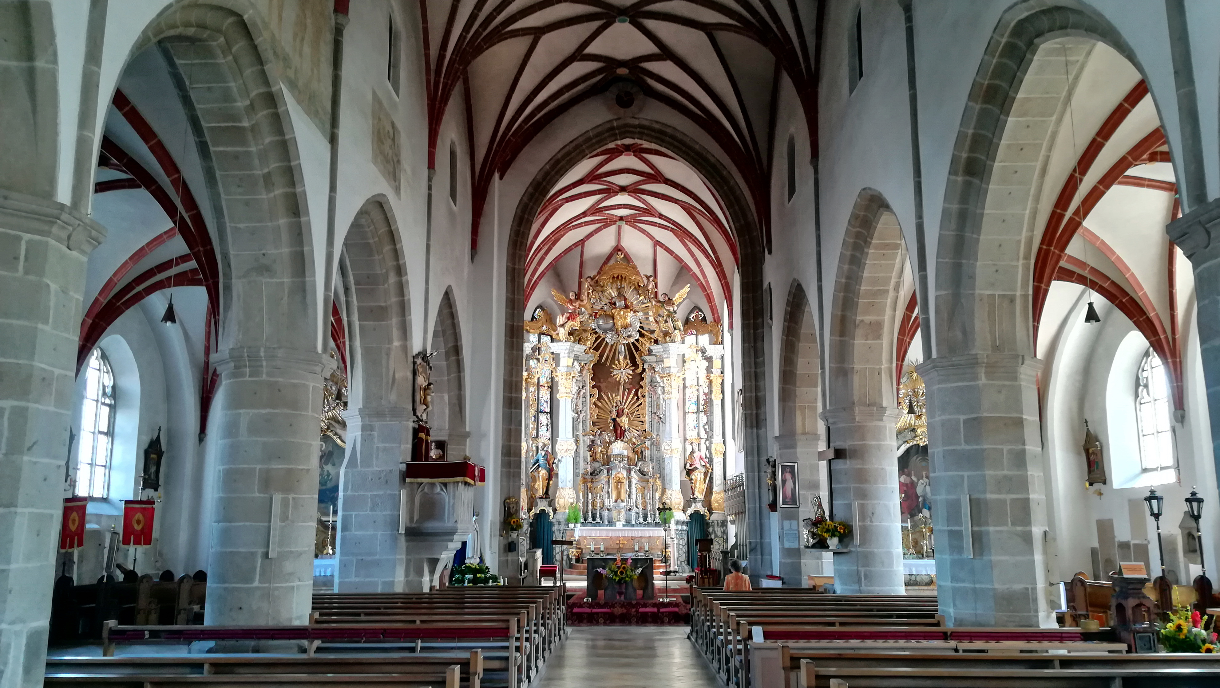 Die katholische Pfarrkirche Mariä Himmelfahrt ist ein denkmalgeschütztes Kirchengebäude in Chammünster.